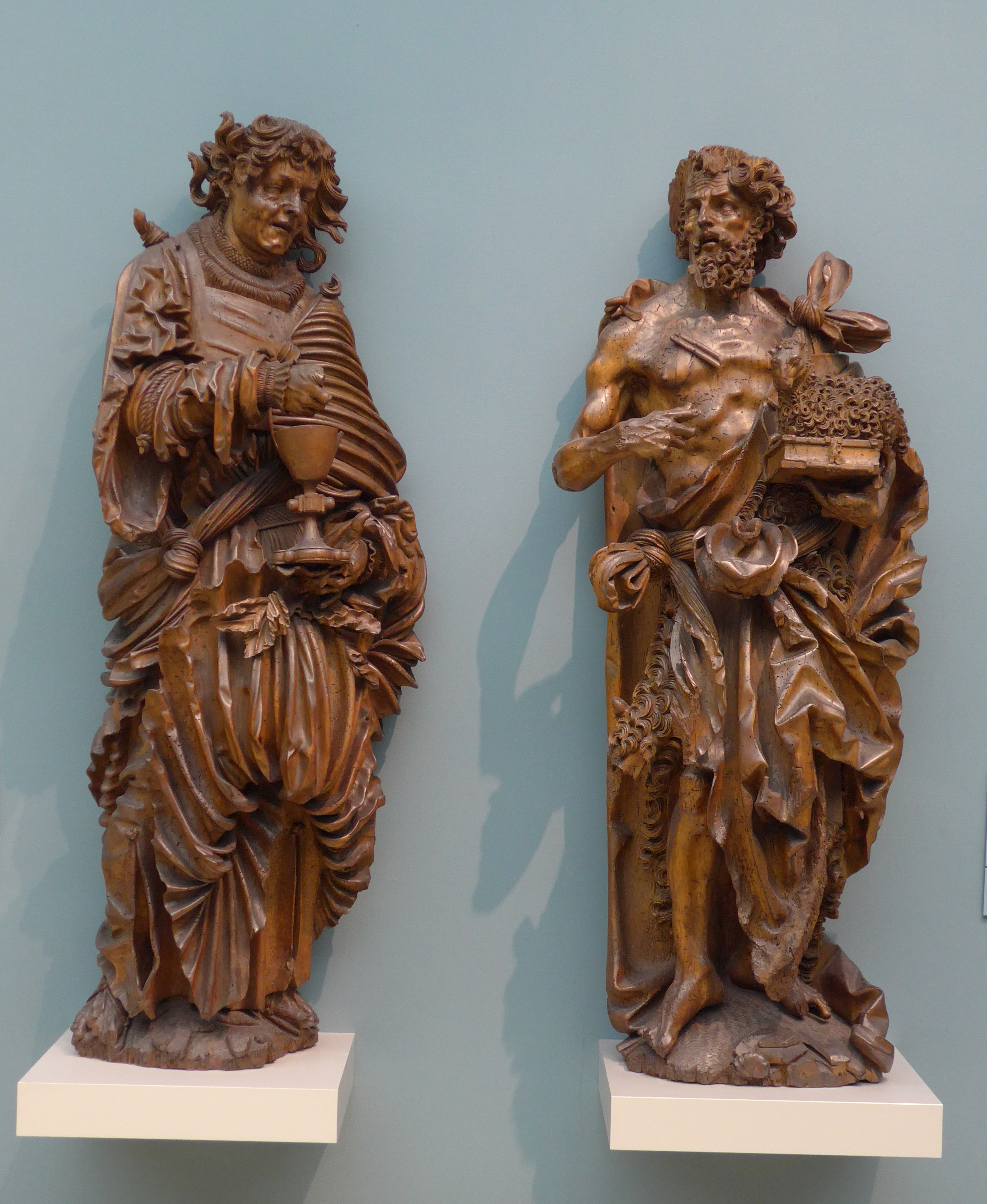 Johannes Ev. und Johannes der Täufer. Skulptur in Lindenholz, Meister HL, Freiburg um 1520-25, Germanisches Nationalmuseum Nürnberg.